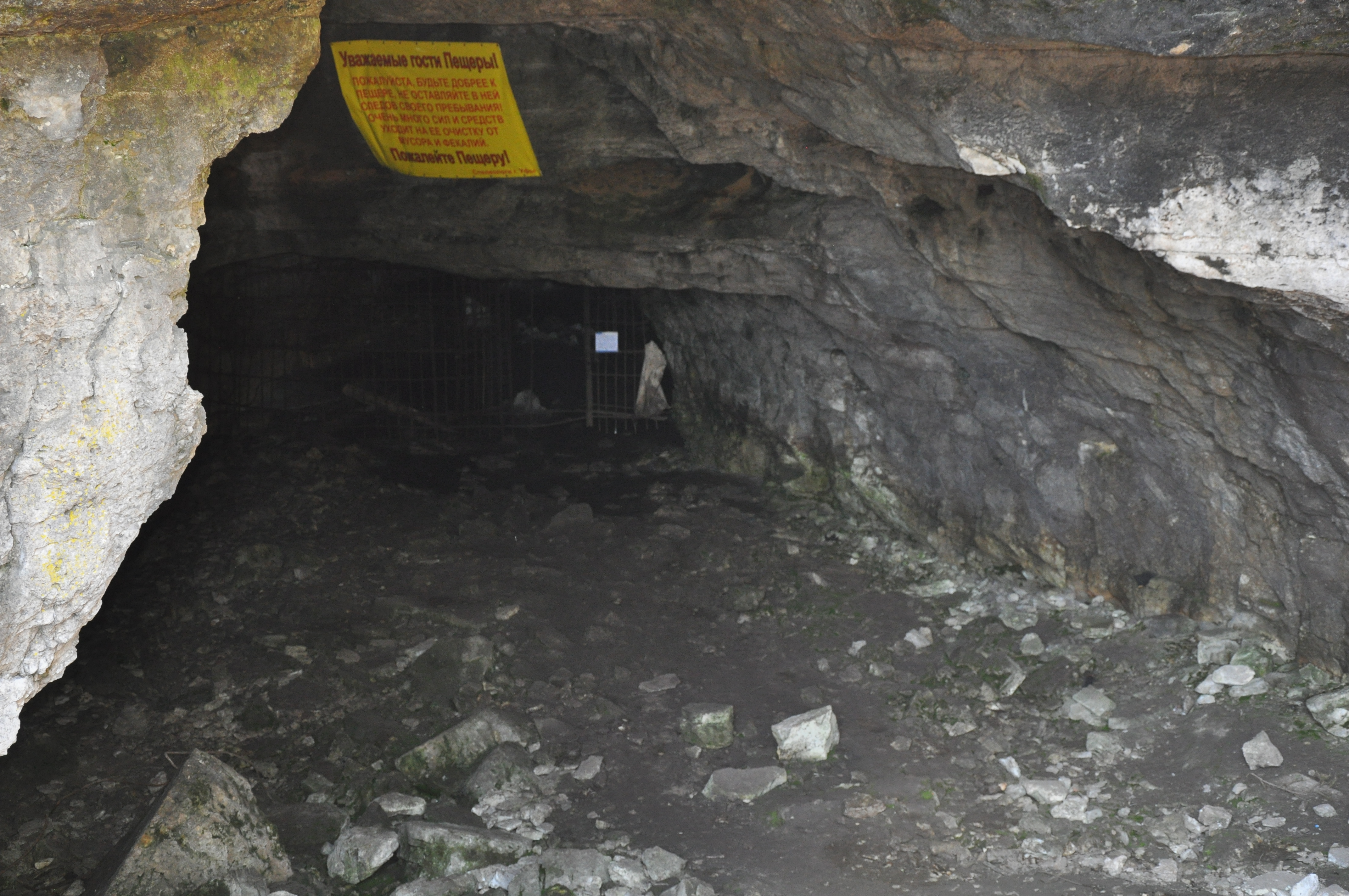 Входной коридор пещеры